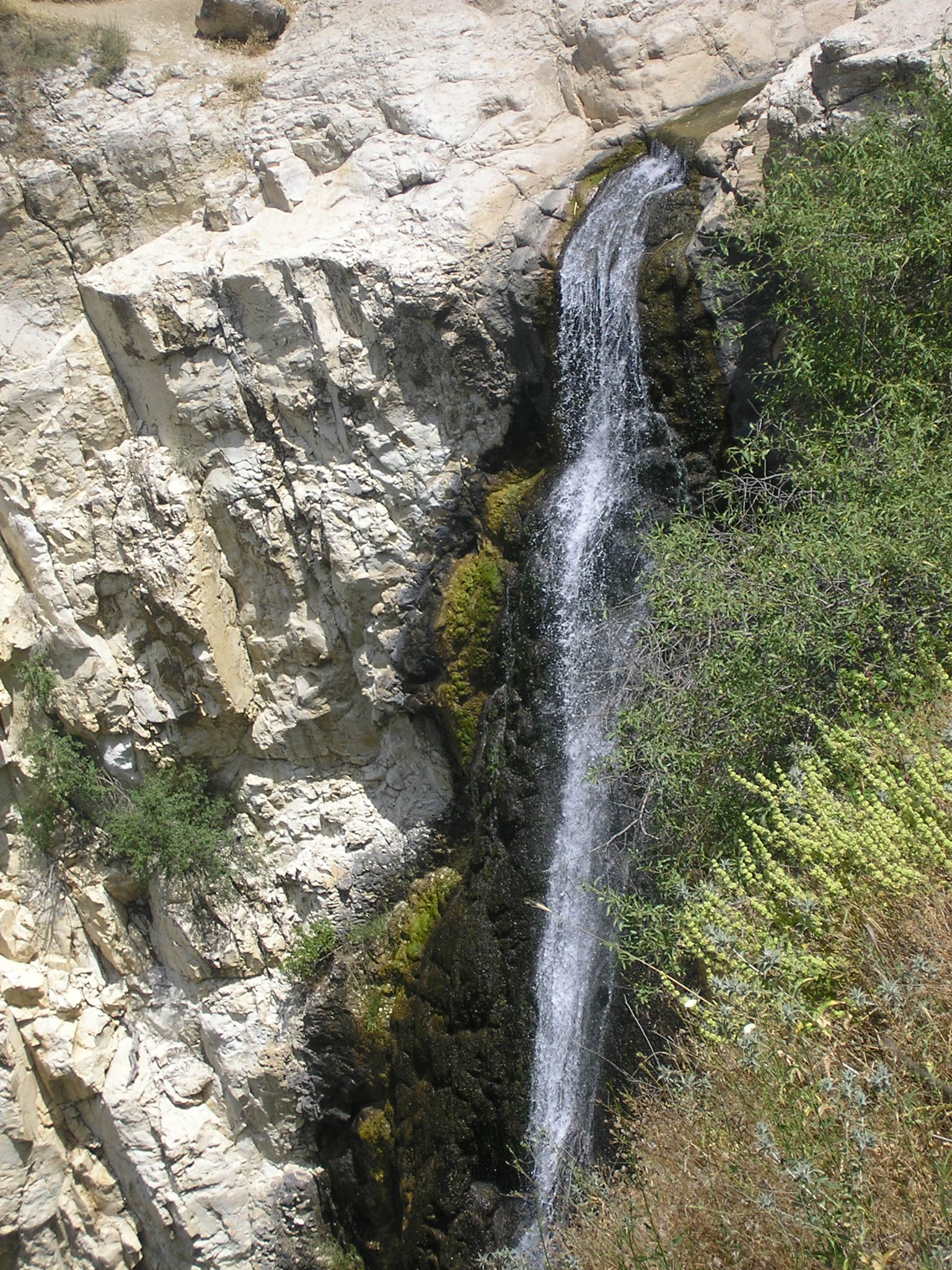 המפל הלבן בנחל אל על